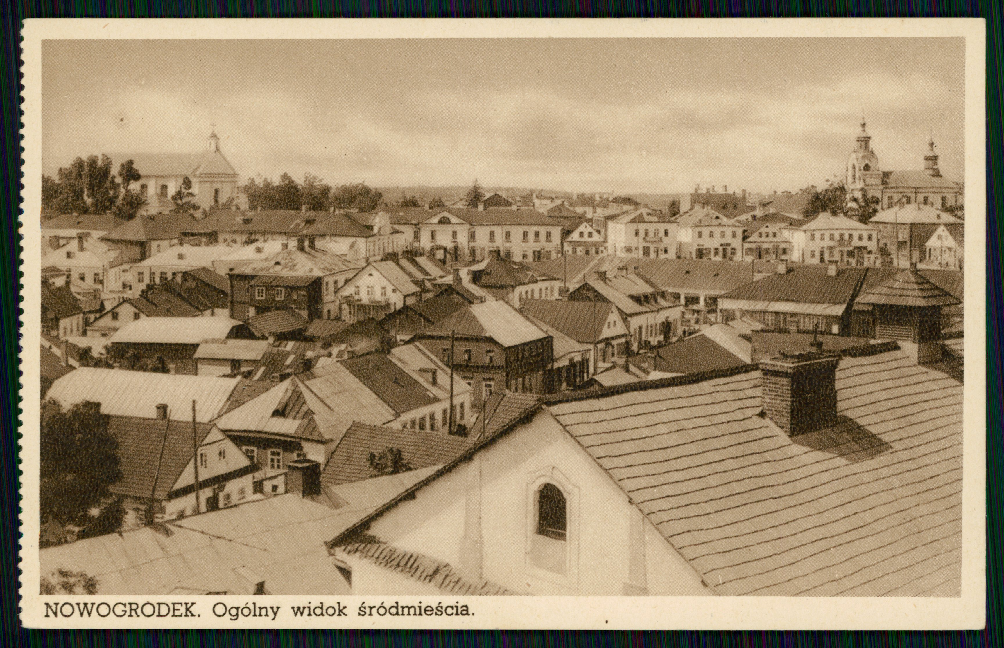 Беларуская (тарашкевіца): Наваградак (Navahradak), пляц Рынак (plac Rynak) з боку Рацэўлі (Raceŭla)